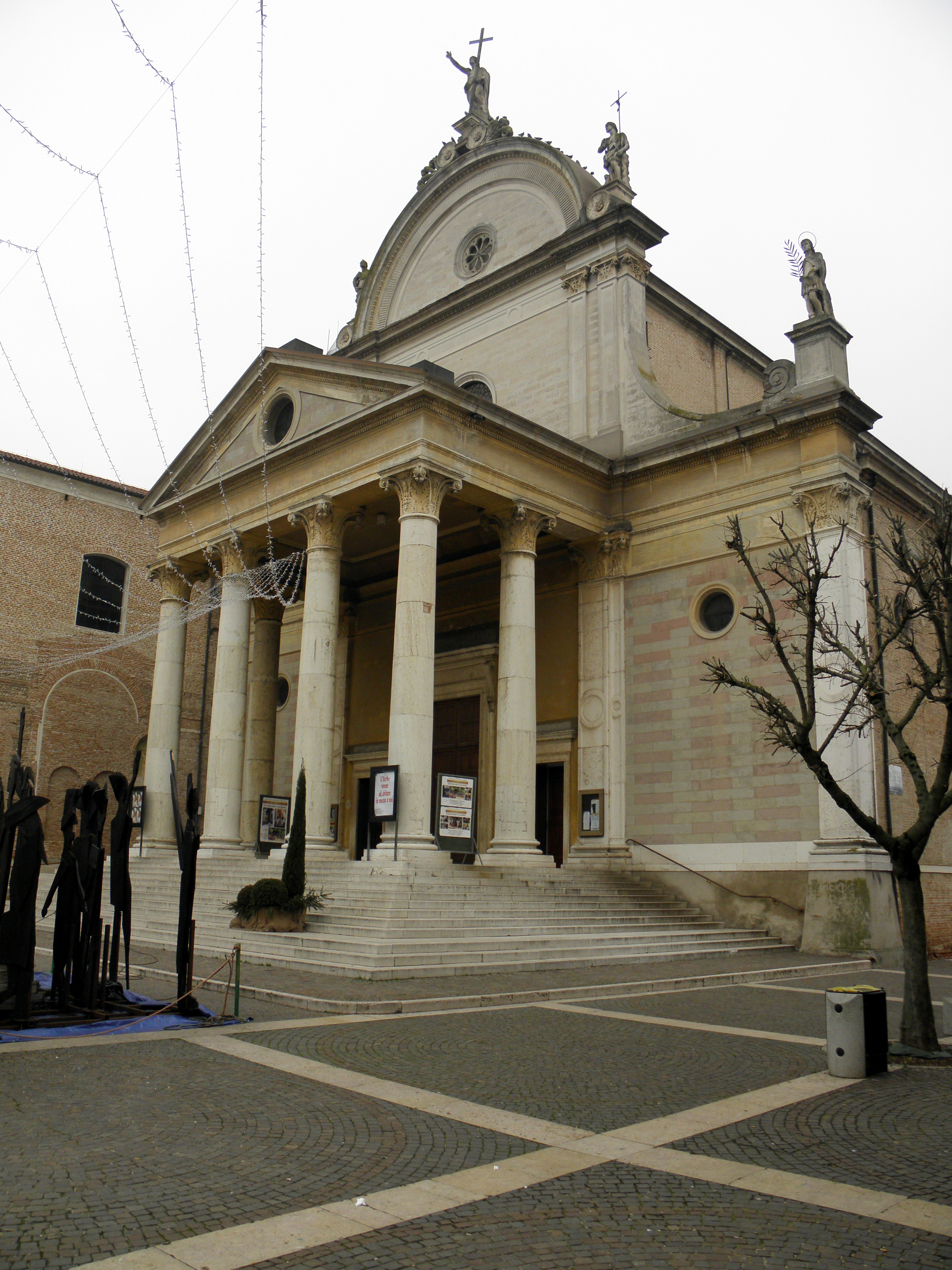 Bovolone, la chiesa parrocchiale di San Giuseppe.